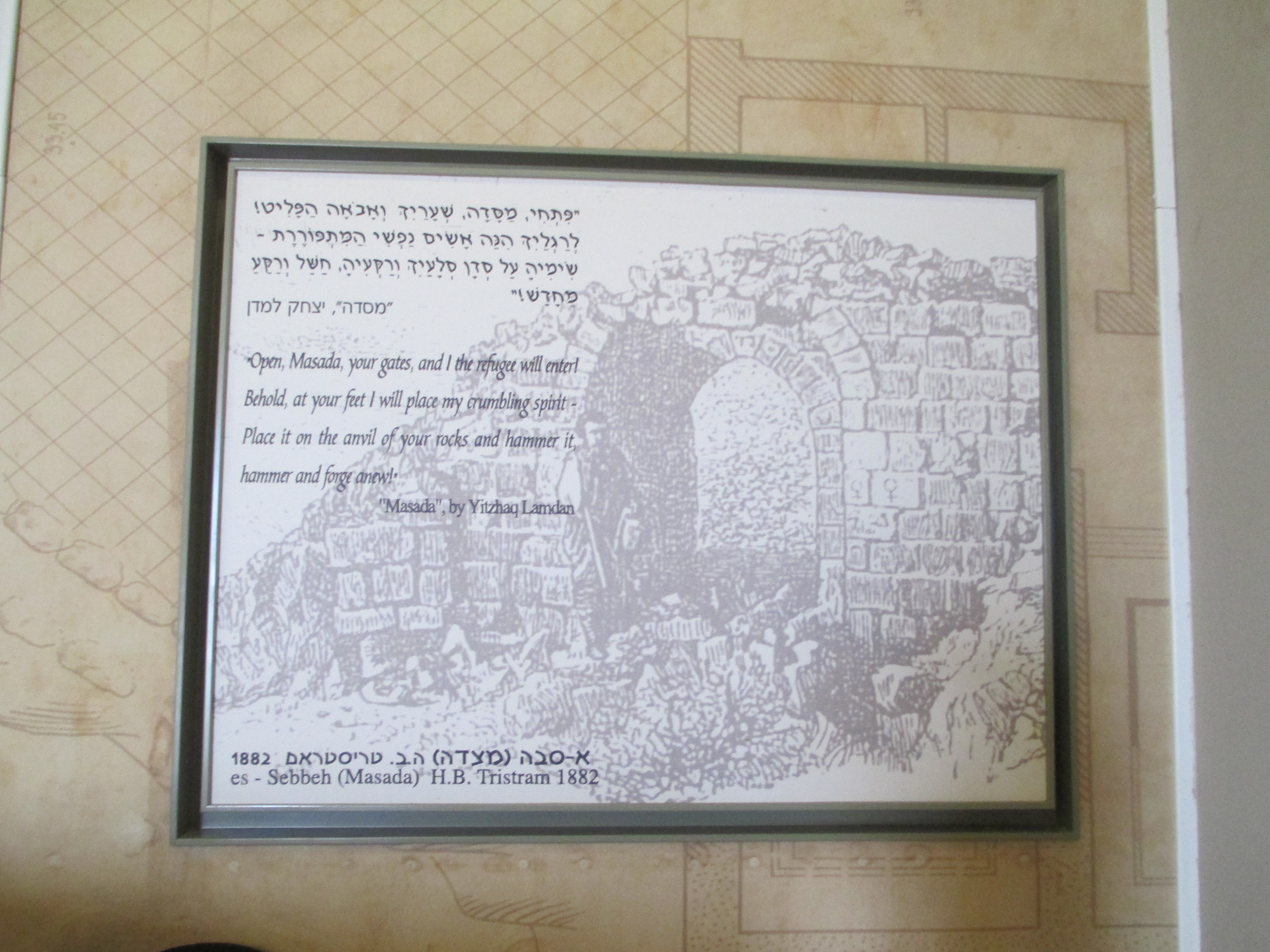 הפואמה מסדה של יצחק למדן במרכז המבקרים במצדה